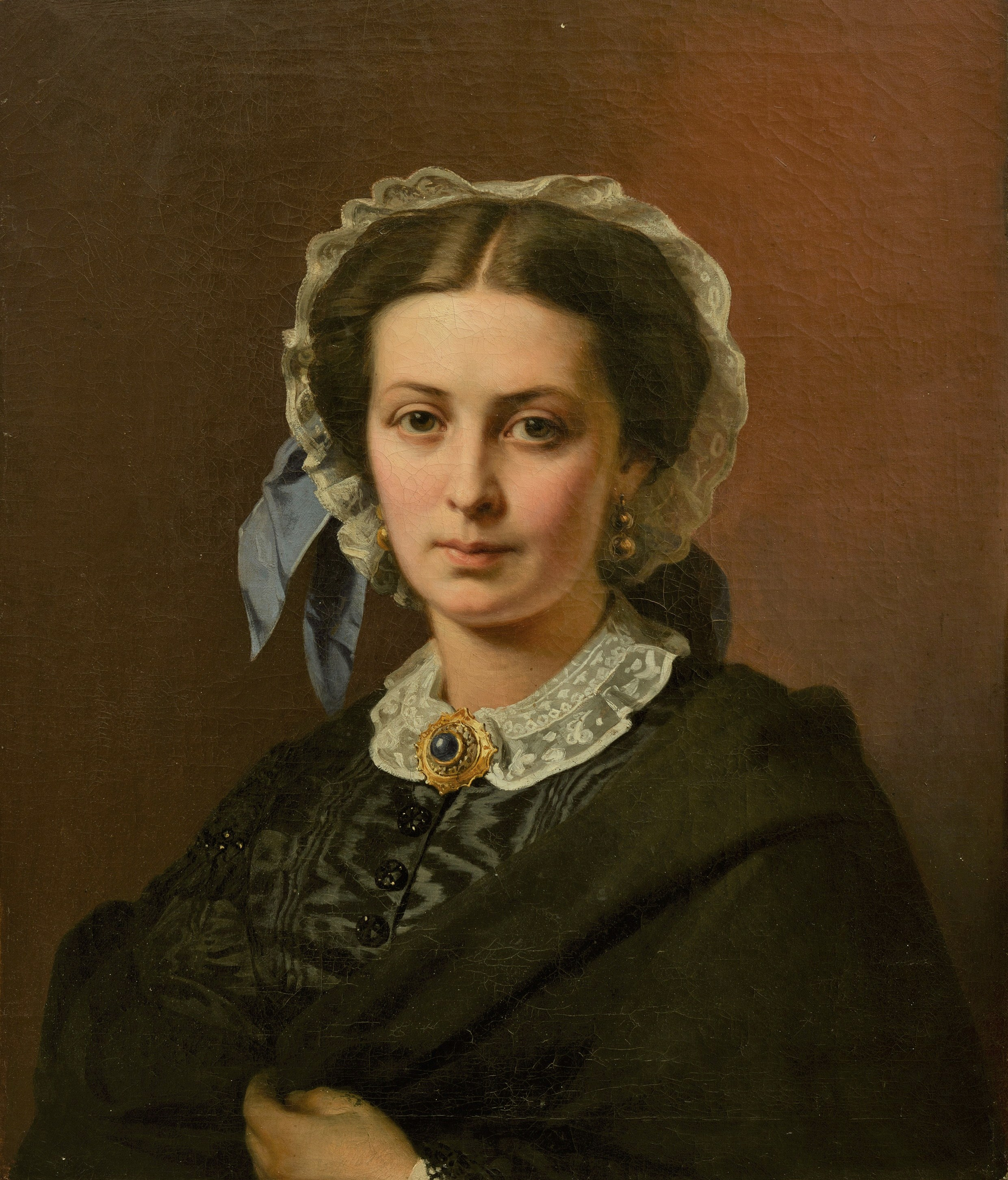 Верещагин Василий Петрович. Портрет Надежды Павловны Боголюбовой. Radishchev Art Museum Native nameСаратовский государственный художественный музей имени А. Н. РадищеваParent institutionThe Ministry of Culture of the Russian FederationLocationSaratov, RussiaCoordinates51° 31′ 53.12″ N, 46° 02′ 18.71″ E Established1878Web page control : Q1270949 VIAF: 156600059 ISNI: 0000 0001 2192 3988 ULAN: 500308804 LCCN: n84049933 GND: 660035-9 WorldCat institution QS:P195,Q1270949